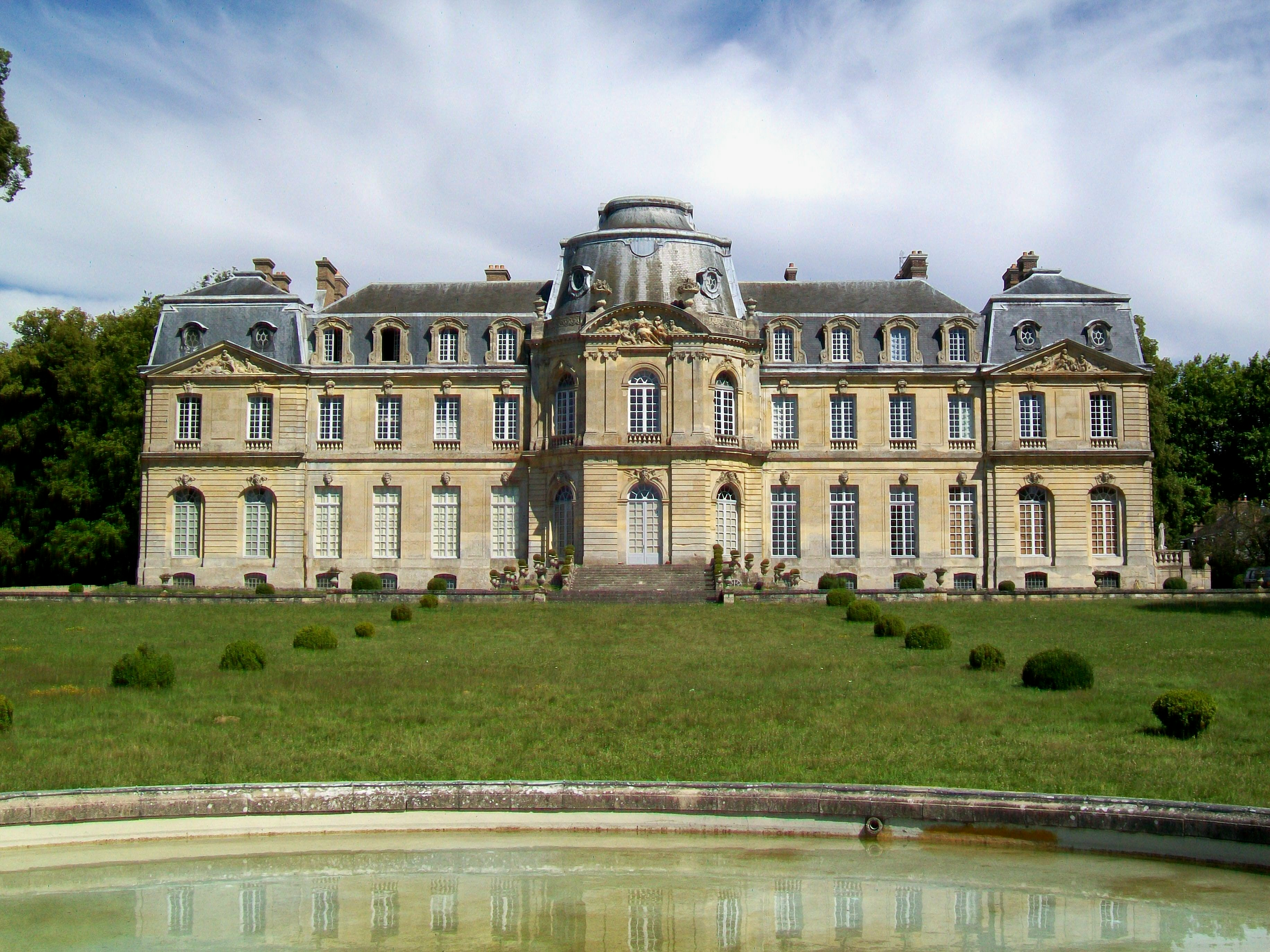 Façade principale ouest, vue générale, avec la pièce d'eau au premier plan.